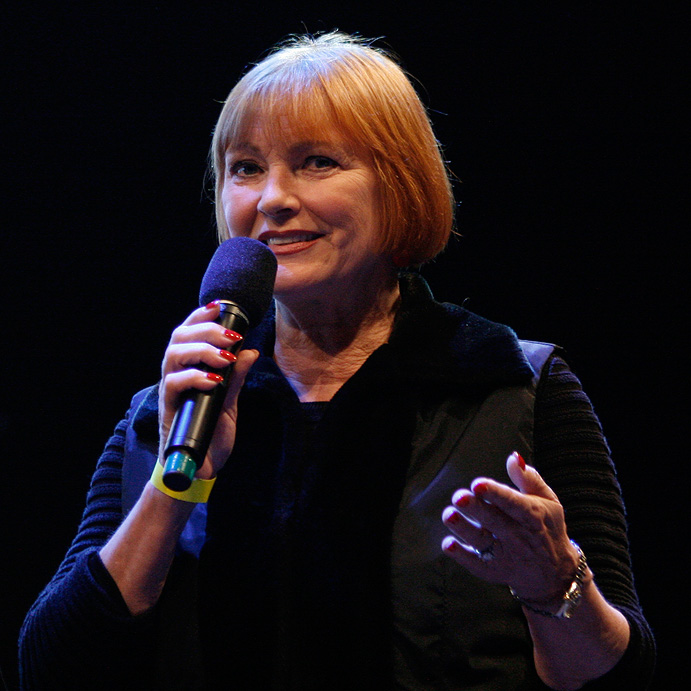 Chris Lohner, Moderation des Vienna Night Run 2009 (Wien)